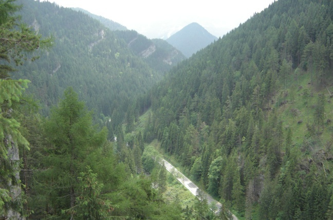 Demänovská Dolina - Slovakia 2005